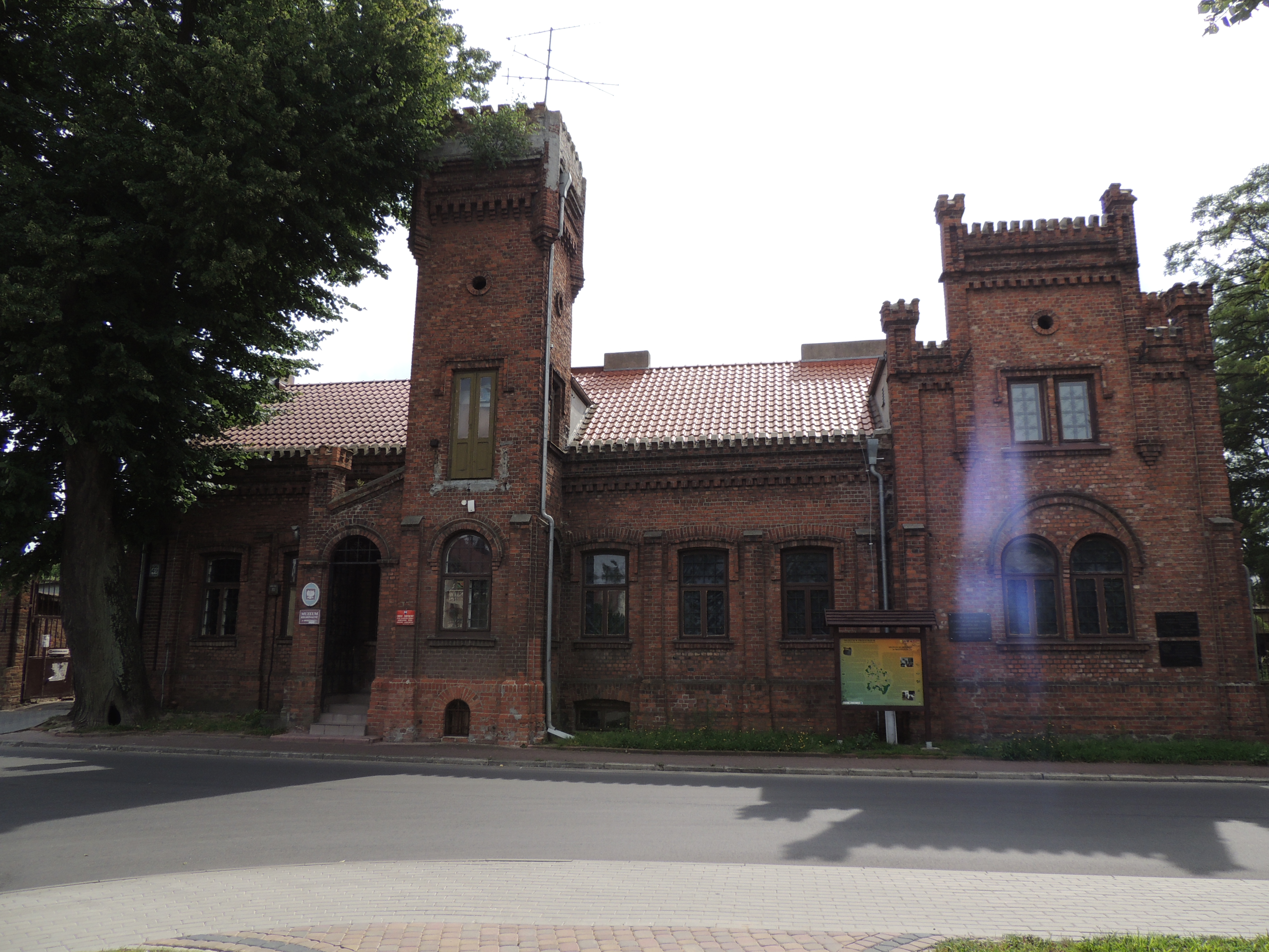 Pałacyk, pocz. XX w., nr 430 oficyna, nr 449 ul. Piłsudskiego 49, Brzeziny, miasto